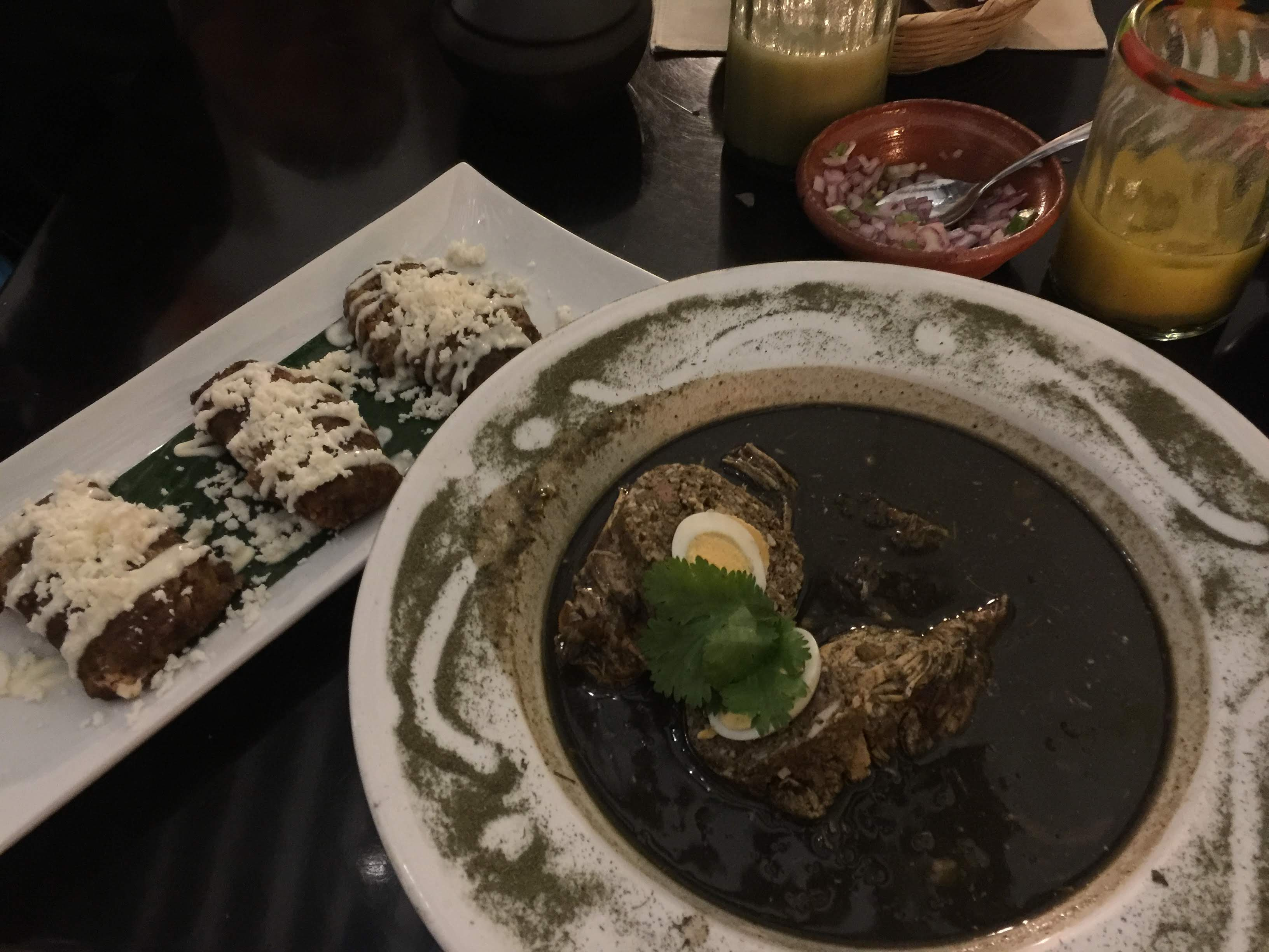 Es un platillo servido en el restaurante Tíkua Sur-Este en el centro histórico de Querétaro.